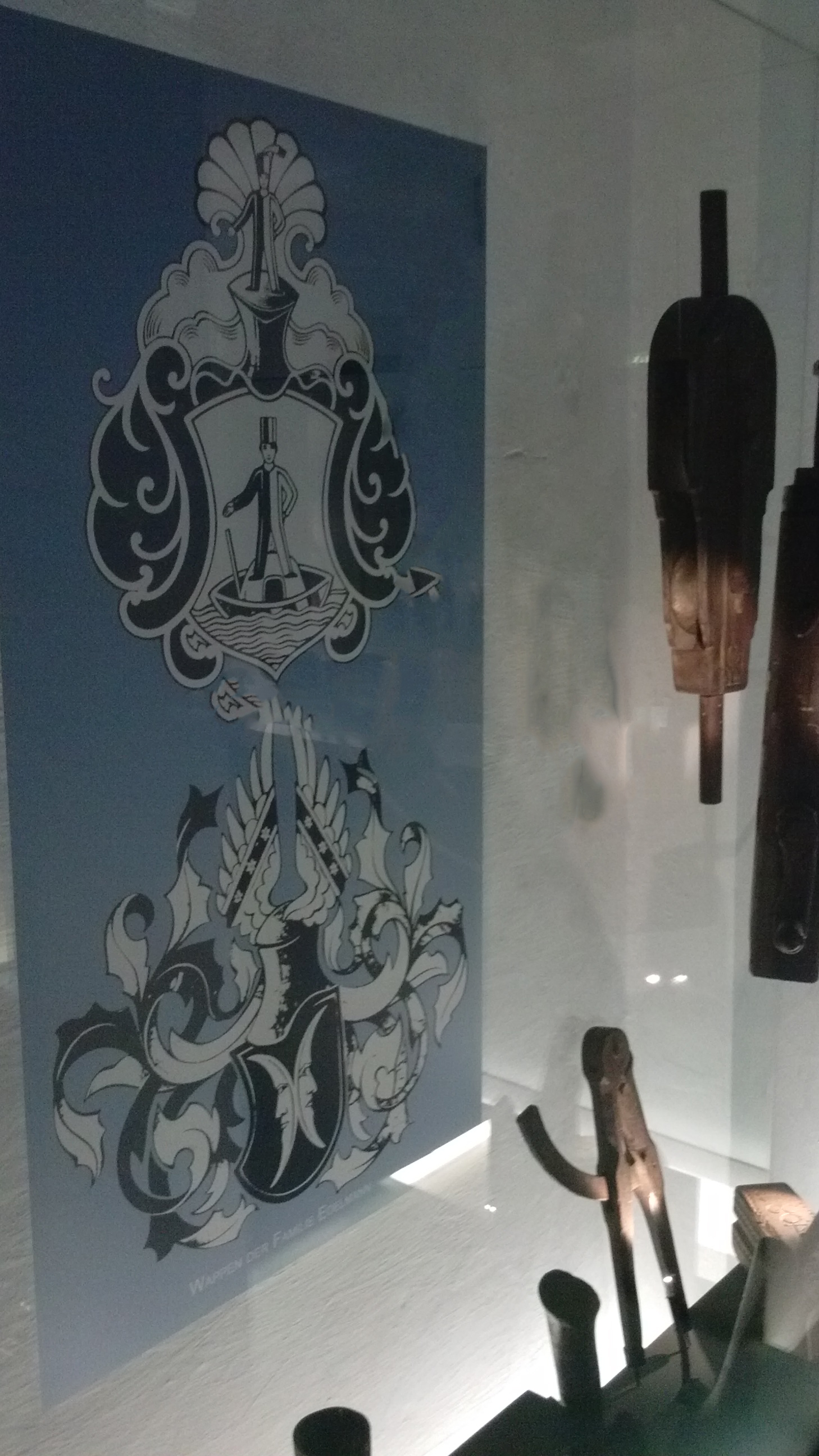 Das historische Salzwesen - Schopper- und Schipperwesen. Salzburg Museum - Keltenmuseum Hallein